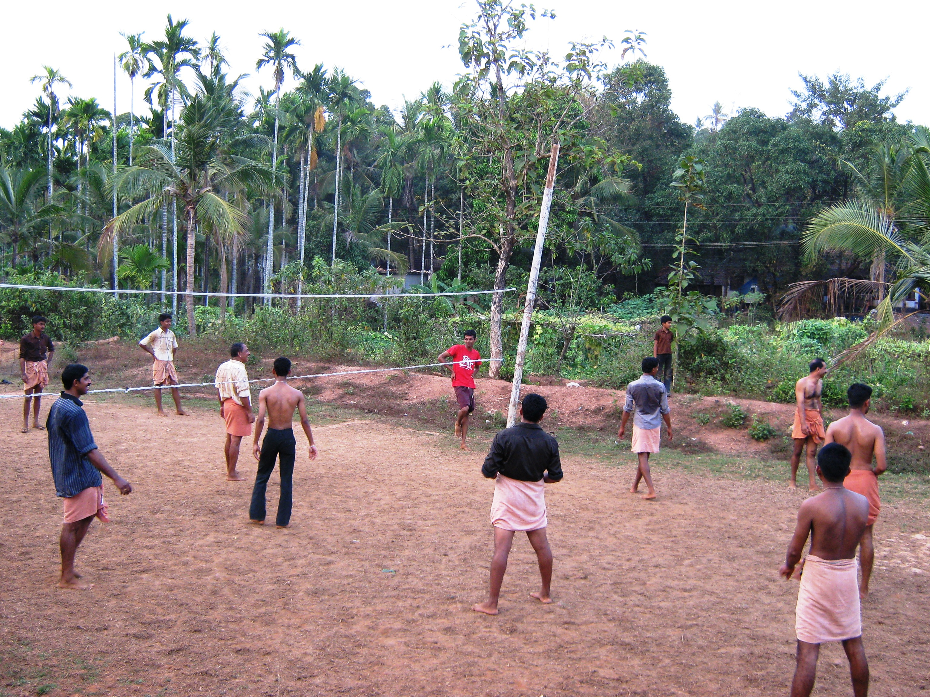 Muyyam village, Taliparamba, Kerala, India